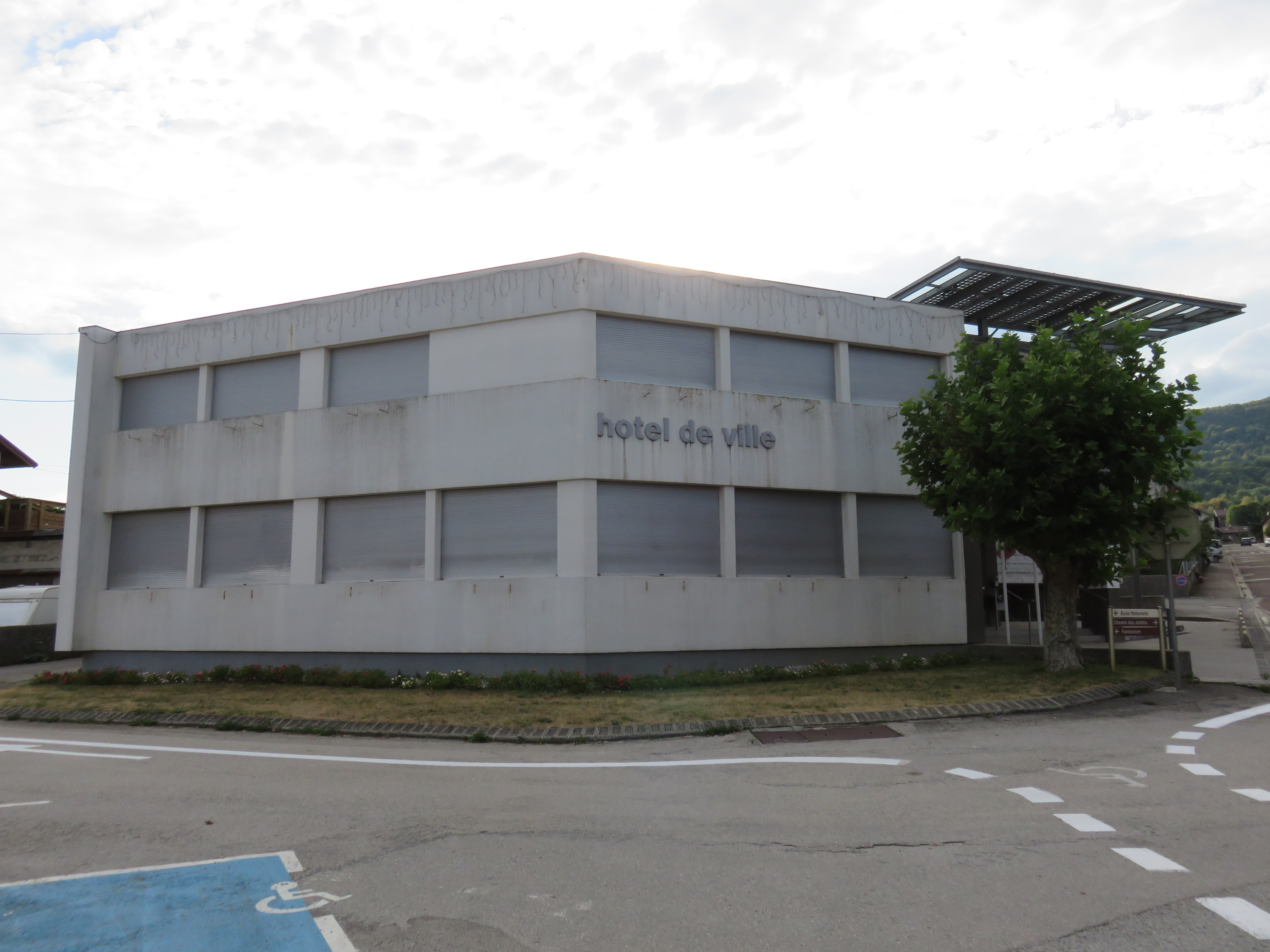 Hôtel de ville de Saint-Lupicin (Jura, France).